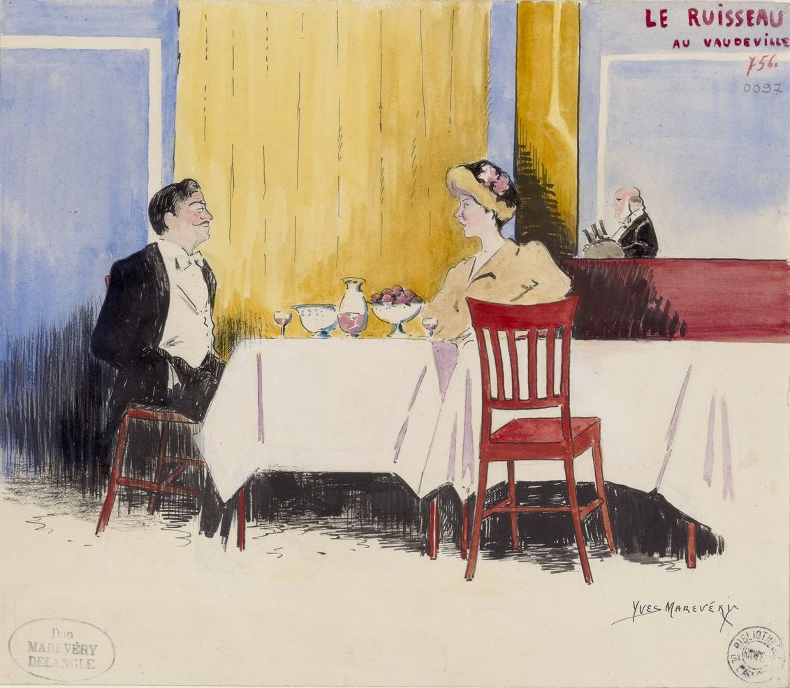 Louis Gauthier et Yvonne de Bray dans "Le ruisseau" de Pierre Wolff , Paris,Théâtre du Vaudeville, 21-03-1907, dessin de Yves Marevéry.